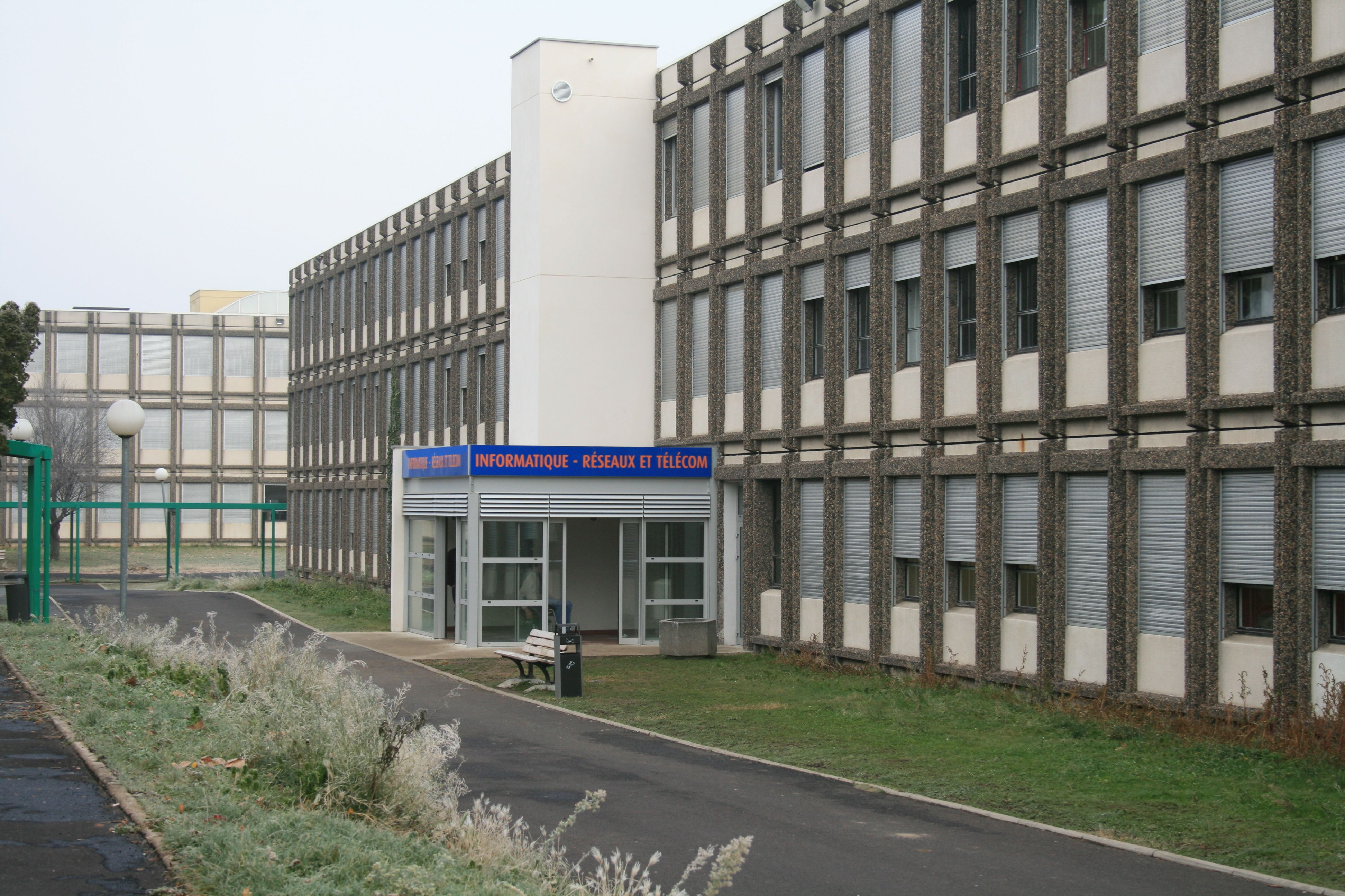 Bâtiment R&T/Info Aubière